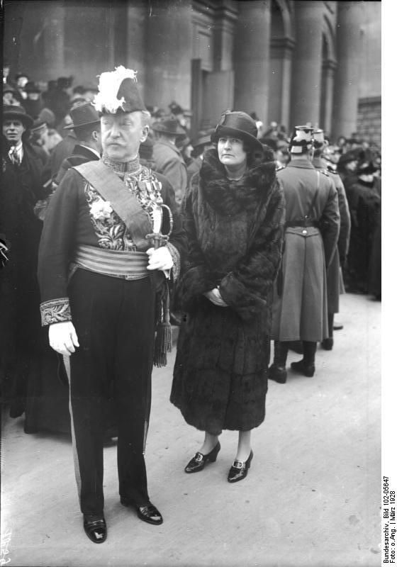 Die Gattin , des französischen Botschafters in Berlin Frau Claire de Margerie gestorben! Letzte Aufnahme der Gattin des französischen Botschafters in Berlin, Frau Claire de Margerie mit ihrem Gemahl.